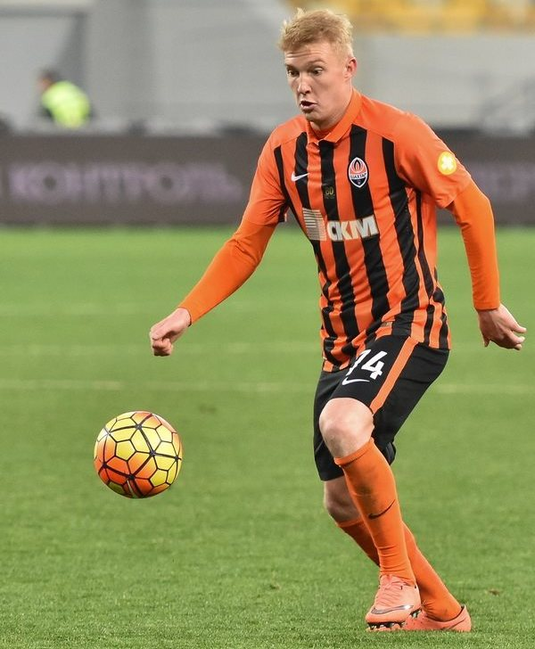 Віктор Коваленко - український футболіст